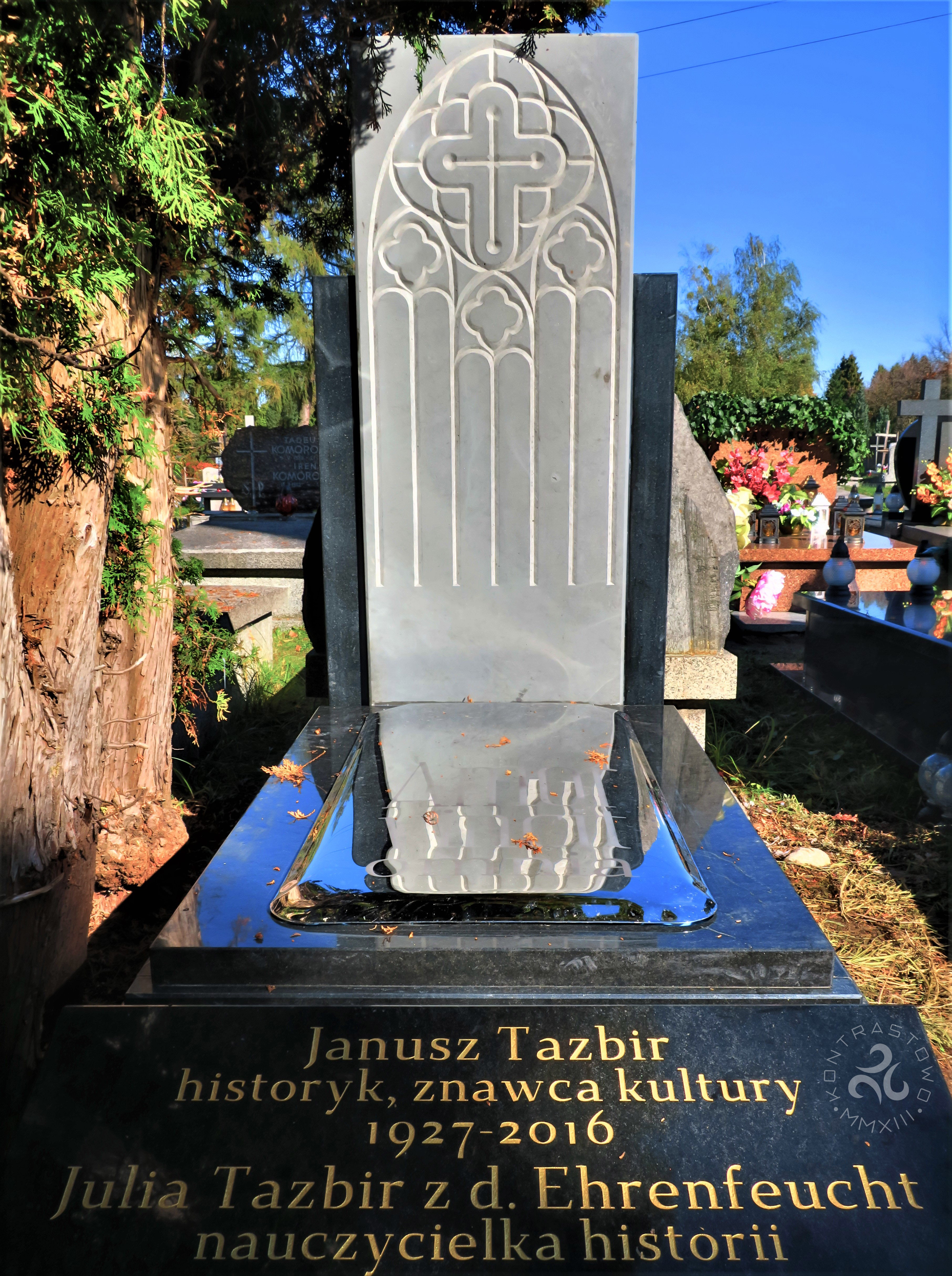 Nagrobek Janusza Tazbira na Cmentarzu Północnym w Warszawie (autor: arch. Tomasz Skorupa Kontrastowo)